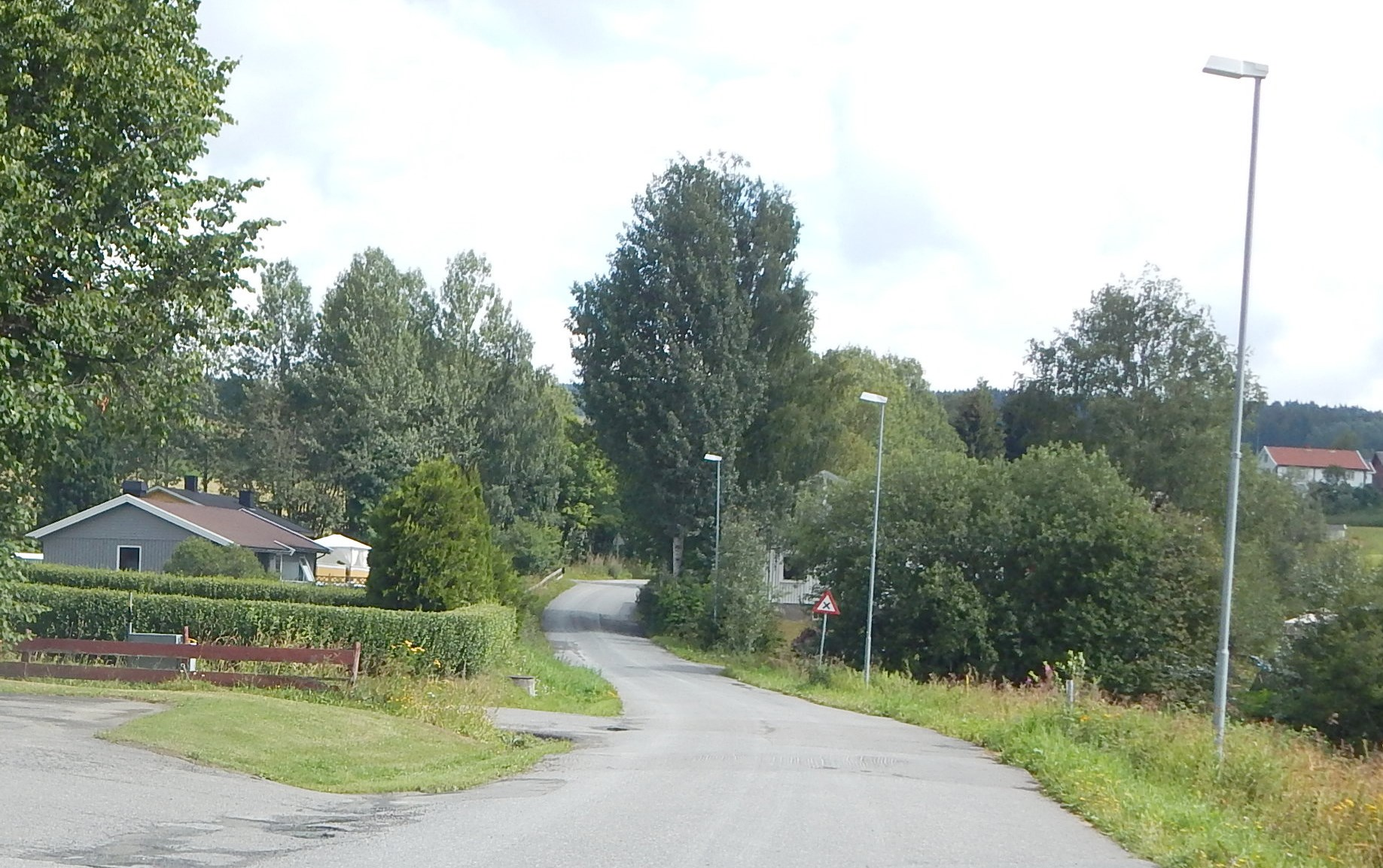 Rognstadvegen (fylkesvei 1712, tidl. 48)